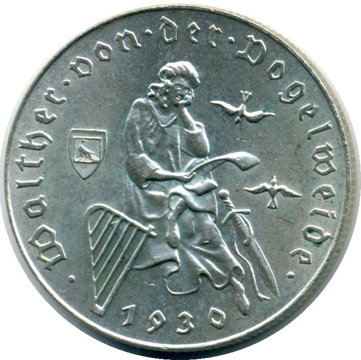 Bildseite der 2-Schilling-Gedenkmünze aus dem Jahr 1930